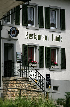 Restaurant Linde in Nenzlingen